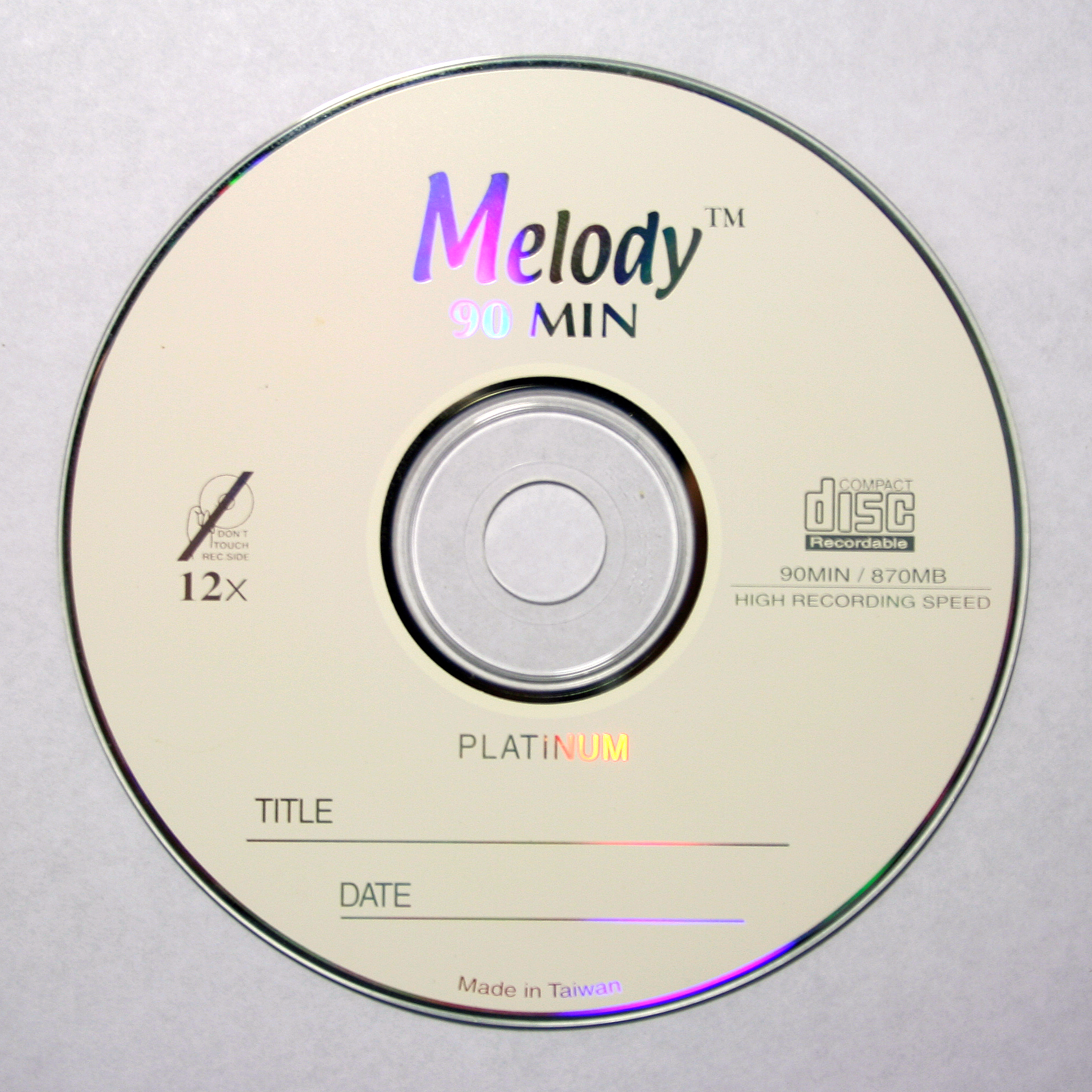 Melody的90分鐘超長白金CD光碟片 User:Weihao.chiu/Weihao.chiu拍攝的圖像